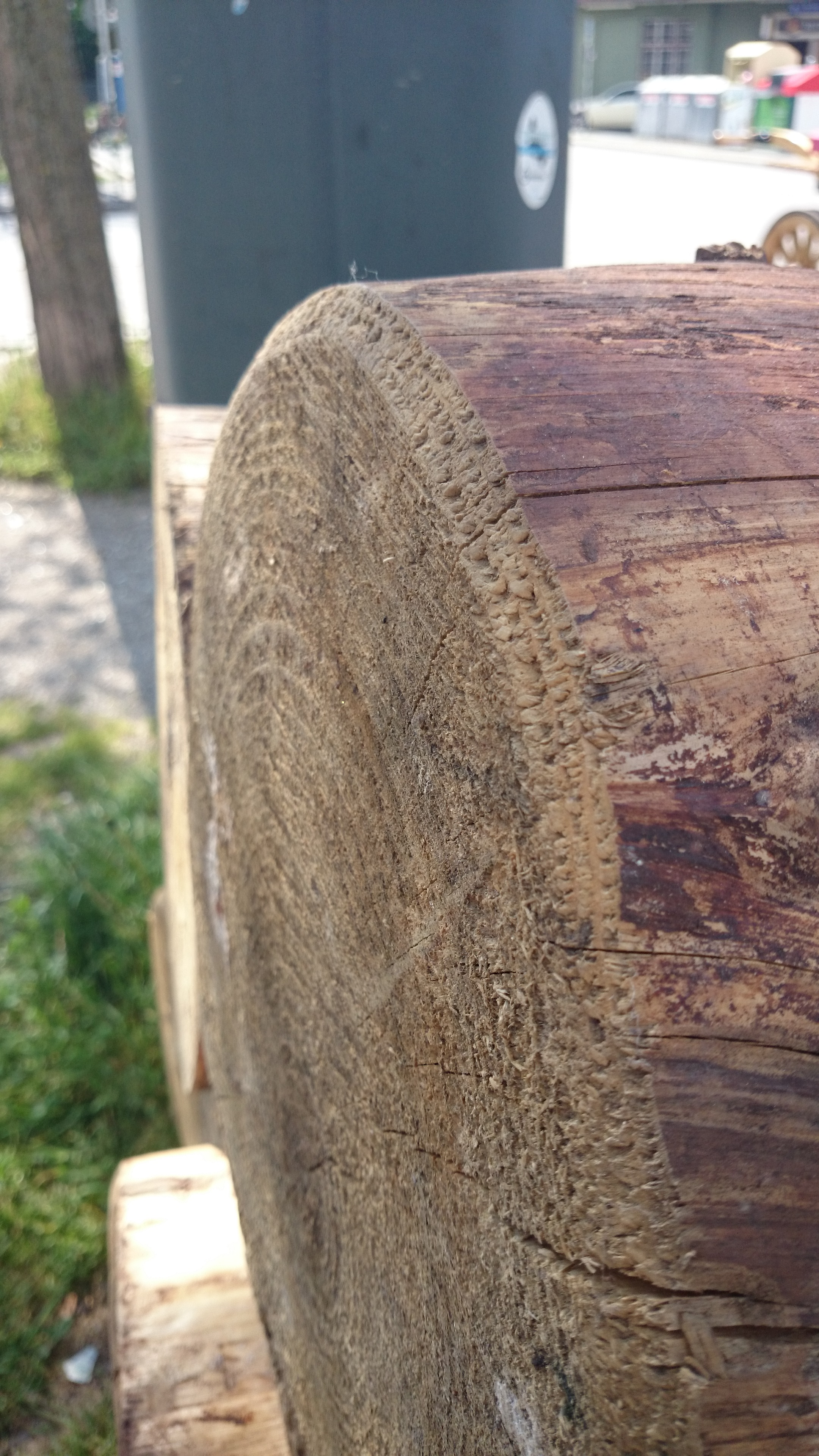 abgesägtes Stück Holz